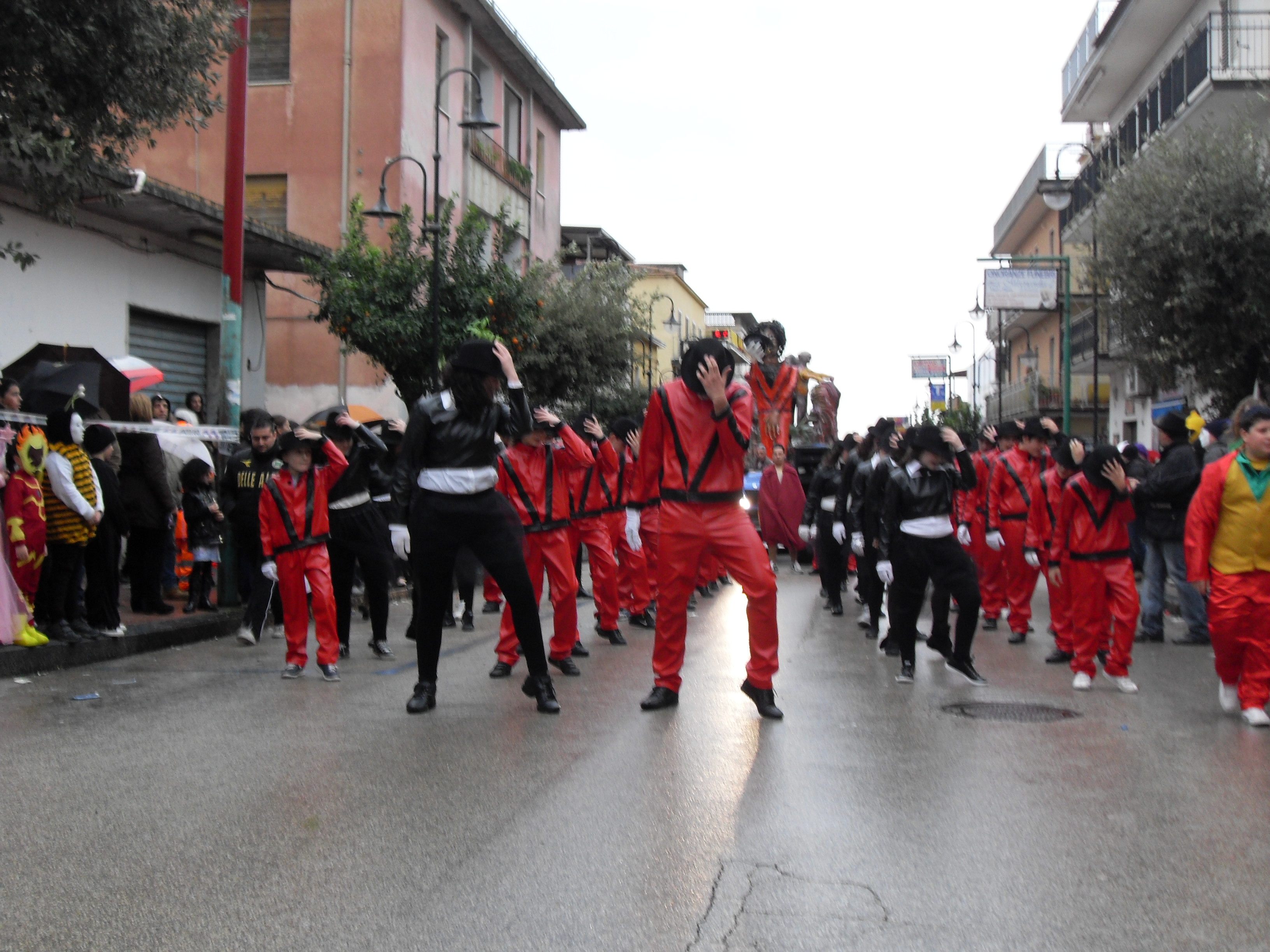 Io sottoscritto Luigi Salvatore Vadacchino, utente di Wikipedia sotto il nome di Lodewijk Vadacchino, cedo l'immagine SDC11481.jpg a Wikimedia Italia, sotto licenza CC-BY-SA, con il nome Campora_San_Giovanni_2010_-_Carnevale_in_Corso_Italia.jpg. L'Immagine fotografica raffigurante il Carnevale 2010 della mia cittadina. Porgo come sempre i miei distintissimi saluti, con l'augurio che possiate venirmi a far visita. Vostro come sempre